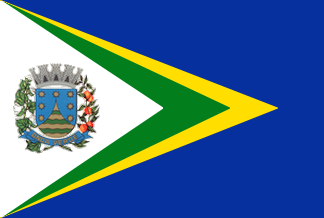 Bandeira de Onda Verde - SP - Brasil.